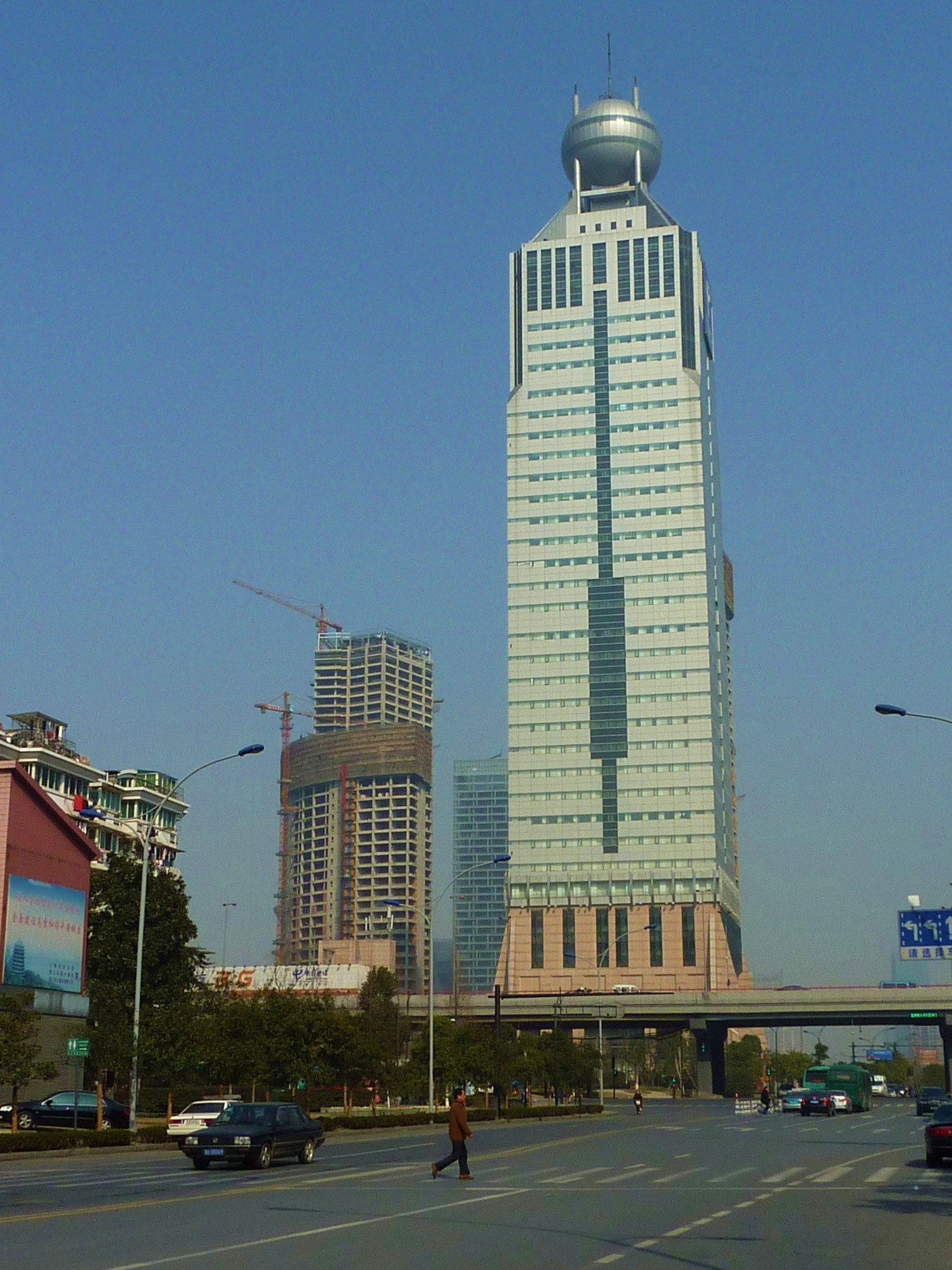 ·˙·ChinaUli2010·.· Hangzhou - Jinjiang